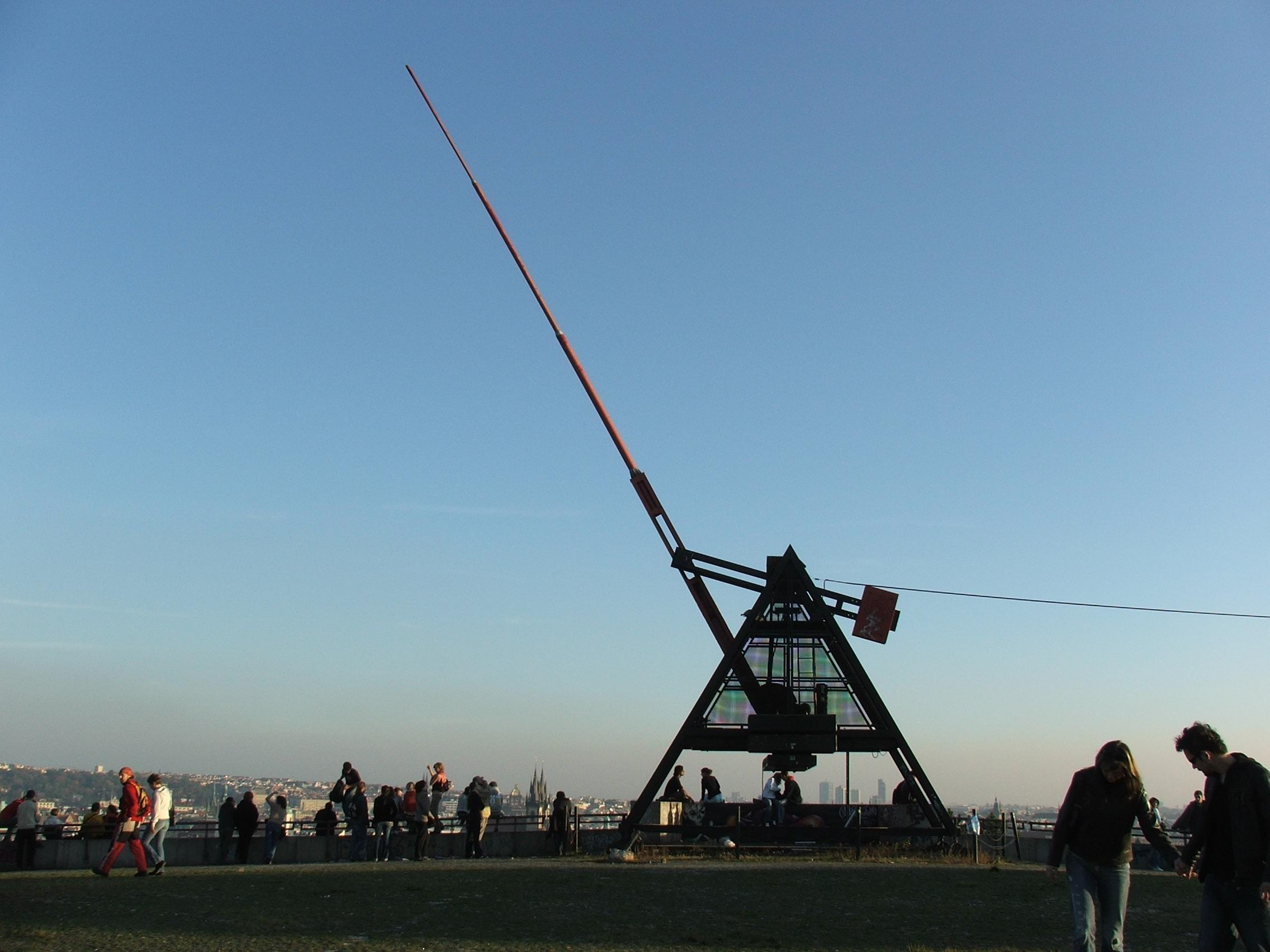 Metronome at Prague - Letná - Metronom v Praze na Letné